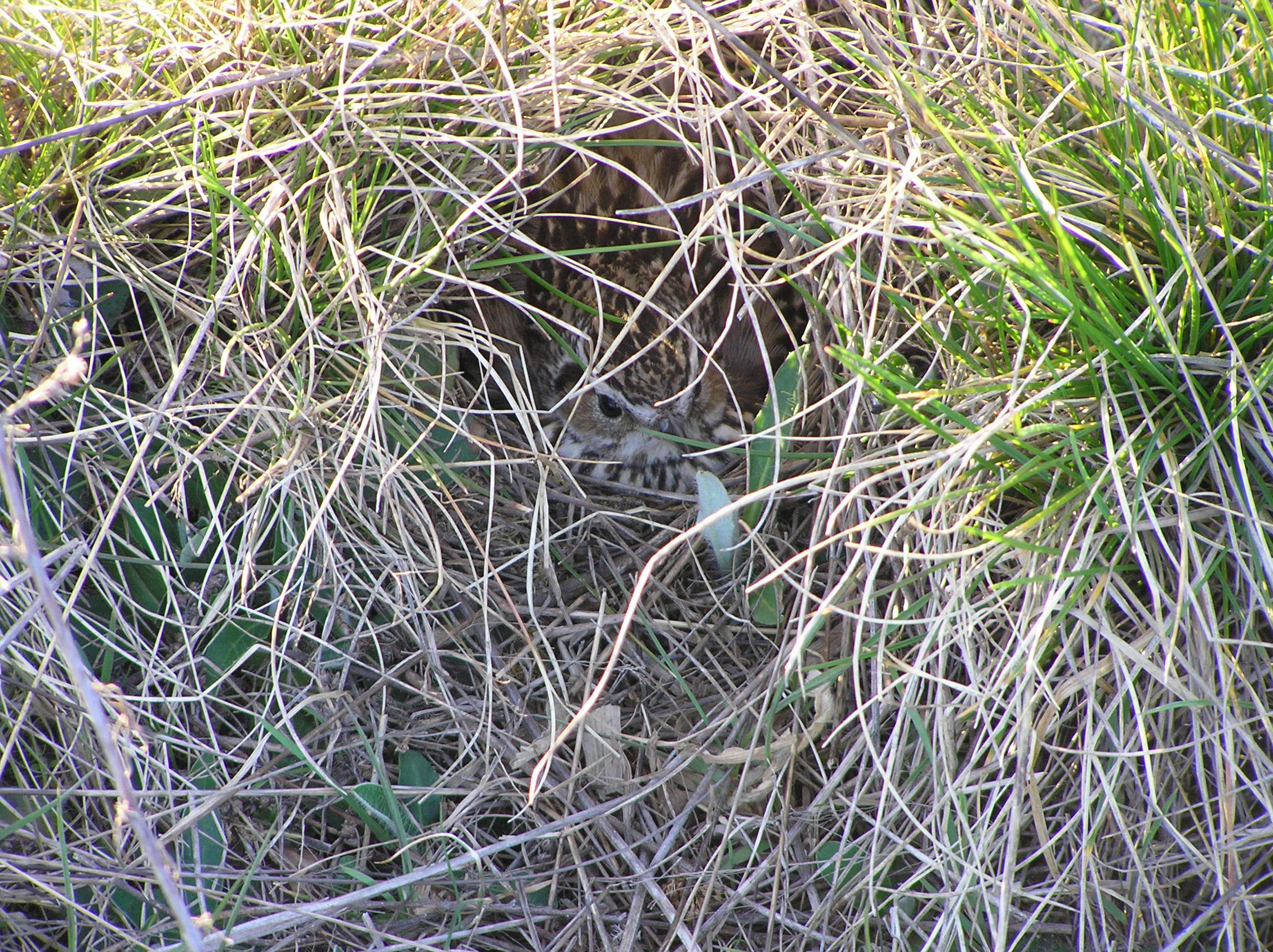 Skowronek, Alauda arvensis Białowieżaforest, Polska